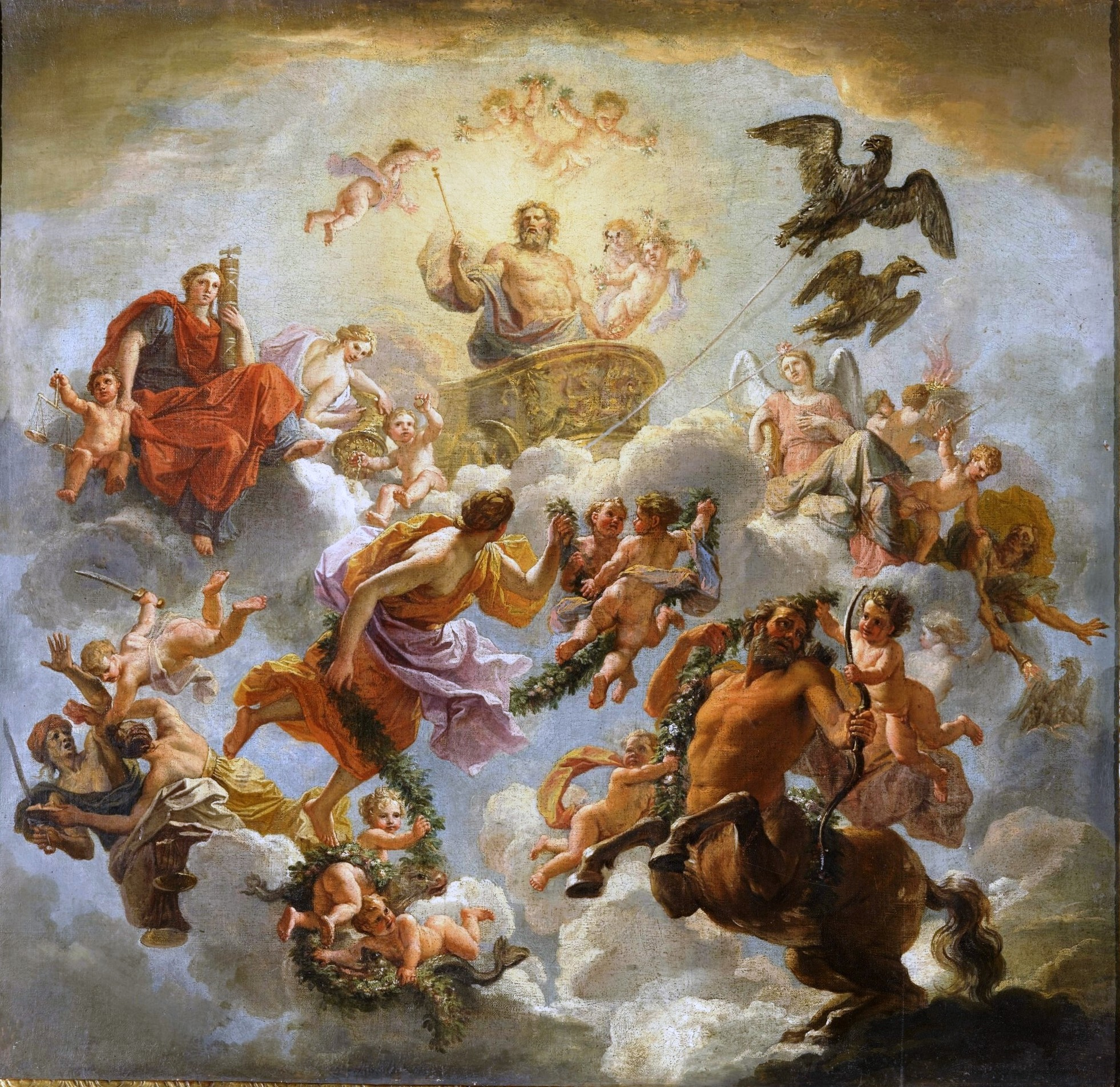 (study)